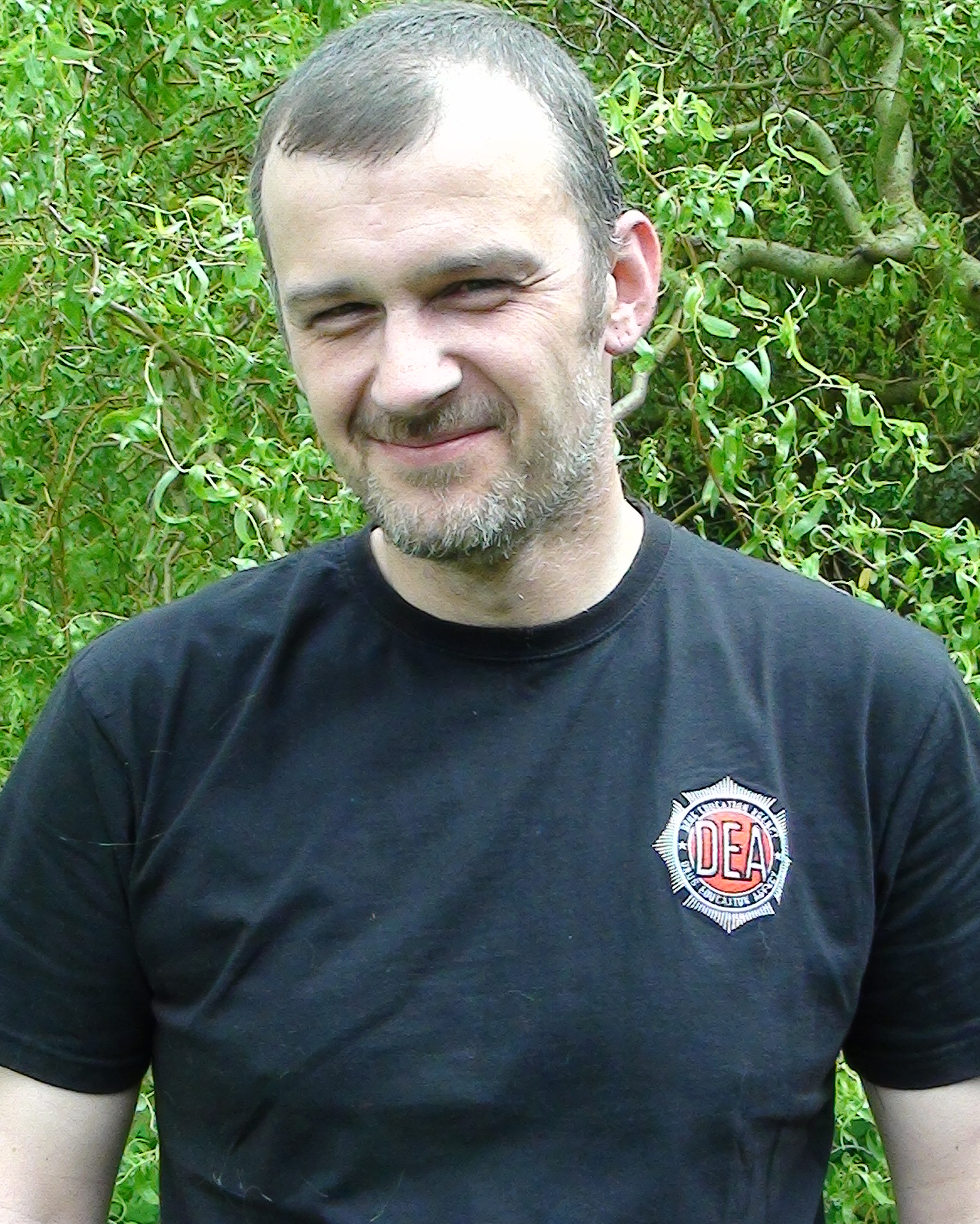 Psychonaut, Ethnopharmakologe, Drogenforscher, Autor und Produzent/Moderator von Blazin Tommy Media (Drug Education Agency und Nachtschatten Television)